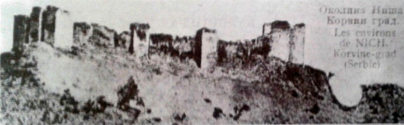 Српски (ћирилица): Копријан,Курвинград,Корвинград, утврђење код Ниша